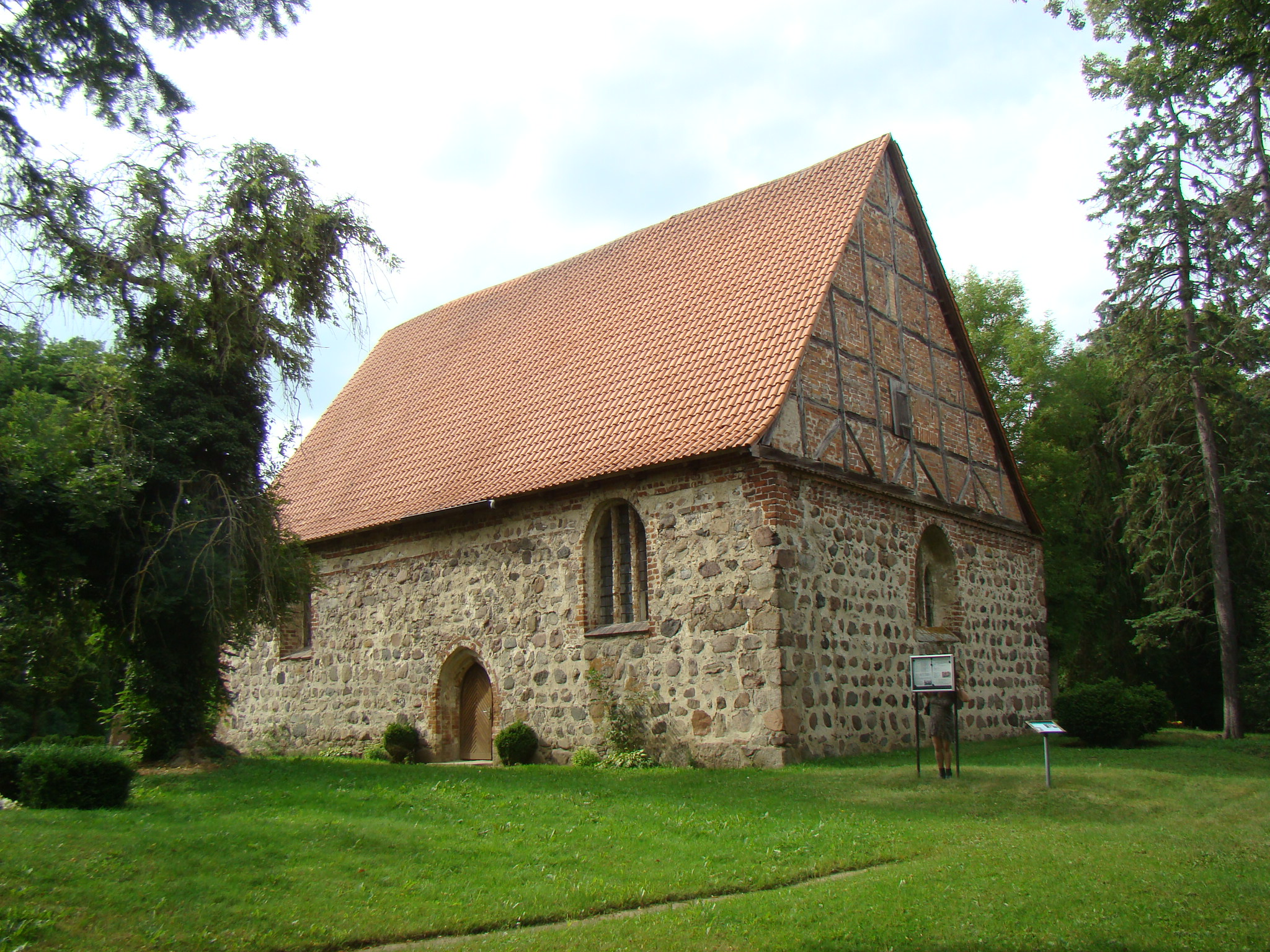 Dorfkirche Lütgendorf, freistehender Glockenstuhl